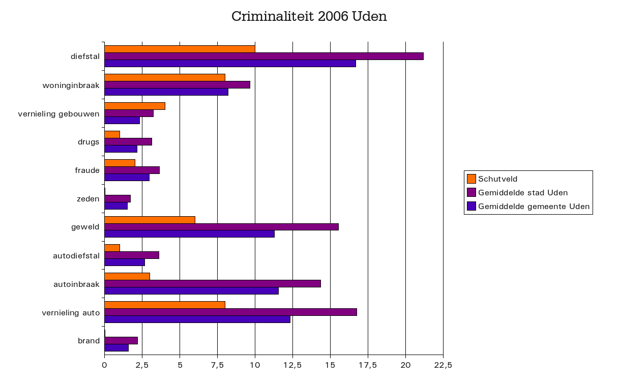 Criminaliteitcijfers in Uden Schutveld (2006), Noord-Brabant, The Netherlands